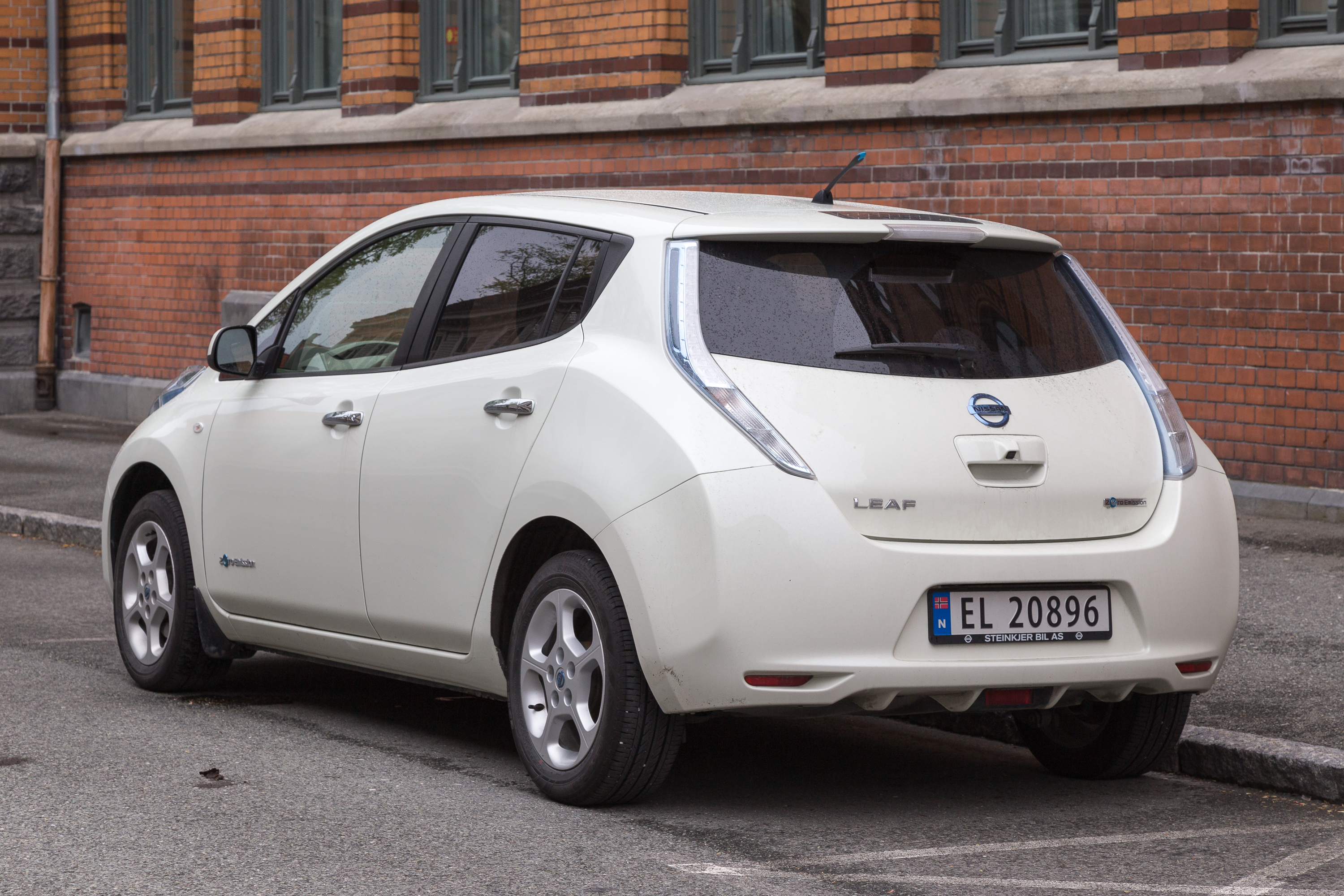 Heckansicht eines Nissan LEAF (2015)